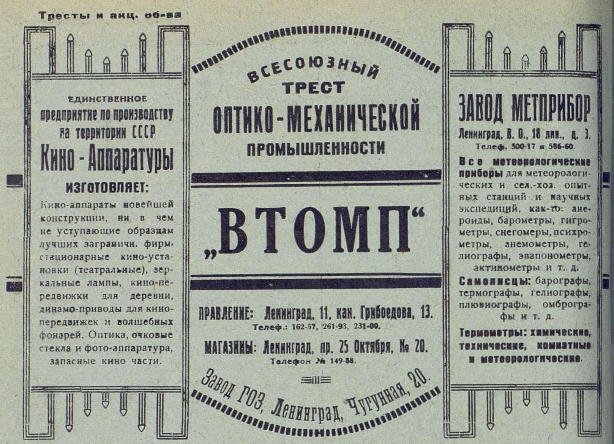 Реклама Всесоюзного треста оптико-механической промышленности, Ленинград, 1930 год.